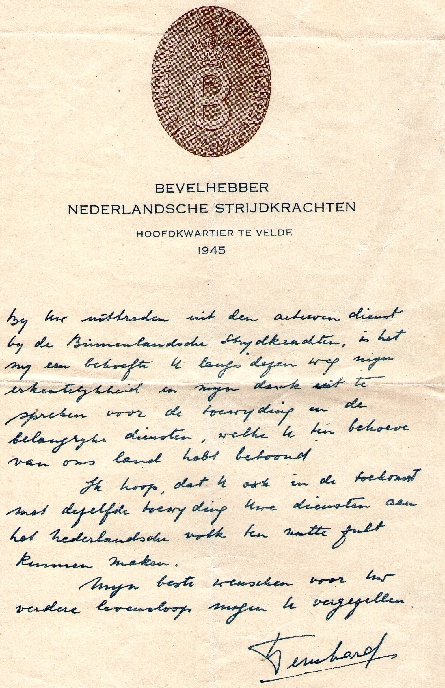 Brief Bevelhebber Nederlandse Strijdkrachten